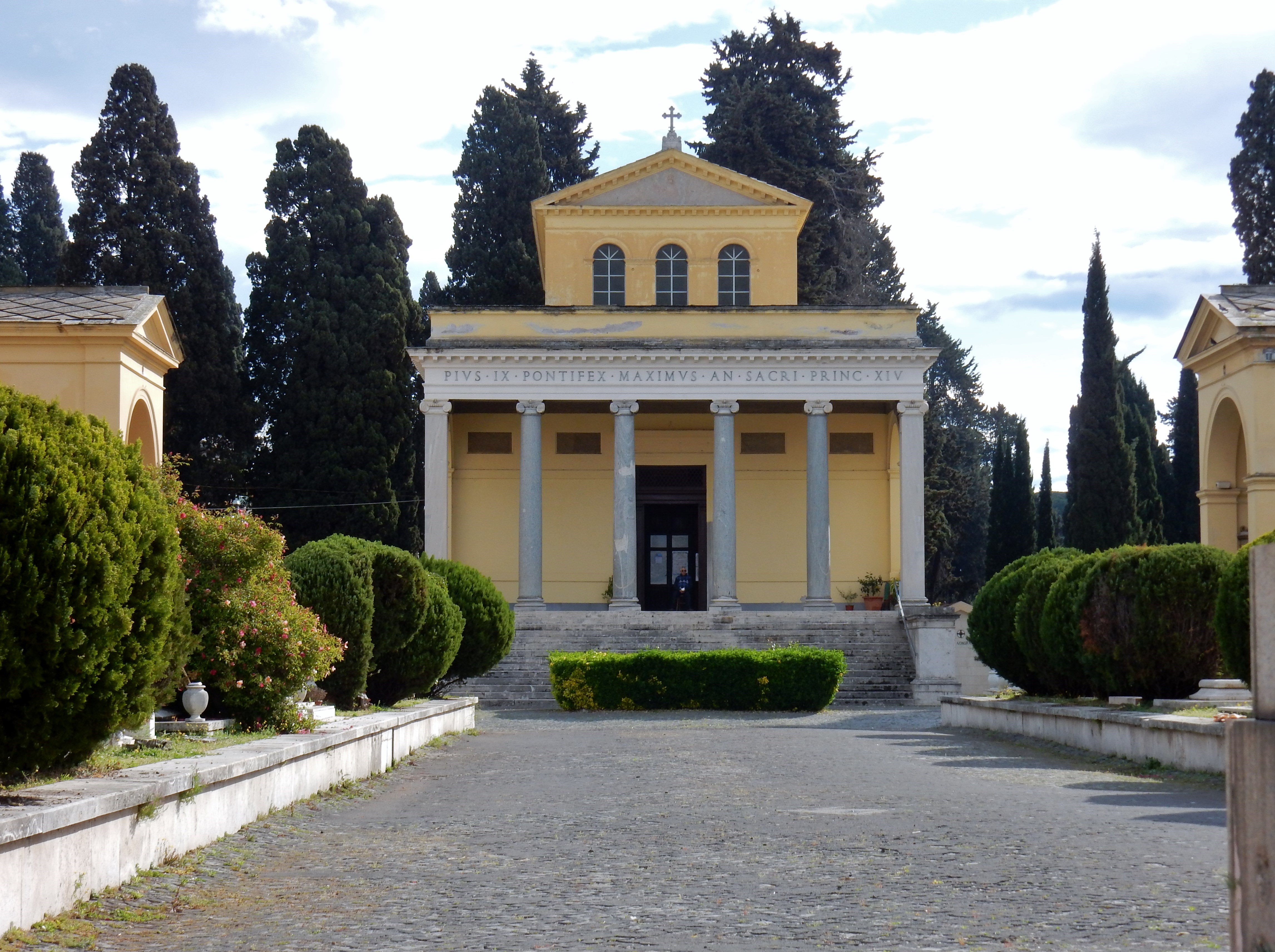 Cimitero del Verano This is a photo of a monument which is part of cultural heritage of Italy.